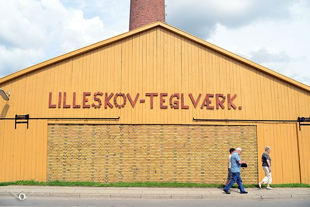 Lilleskov teglværk - Old brick work factory now a museum